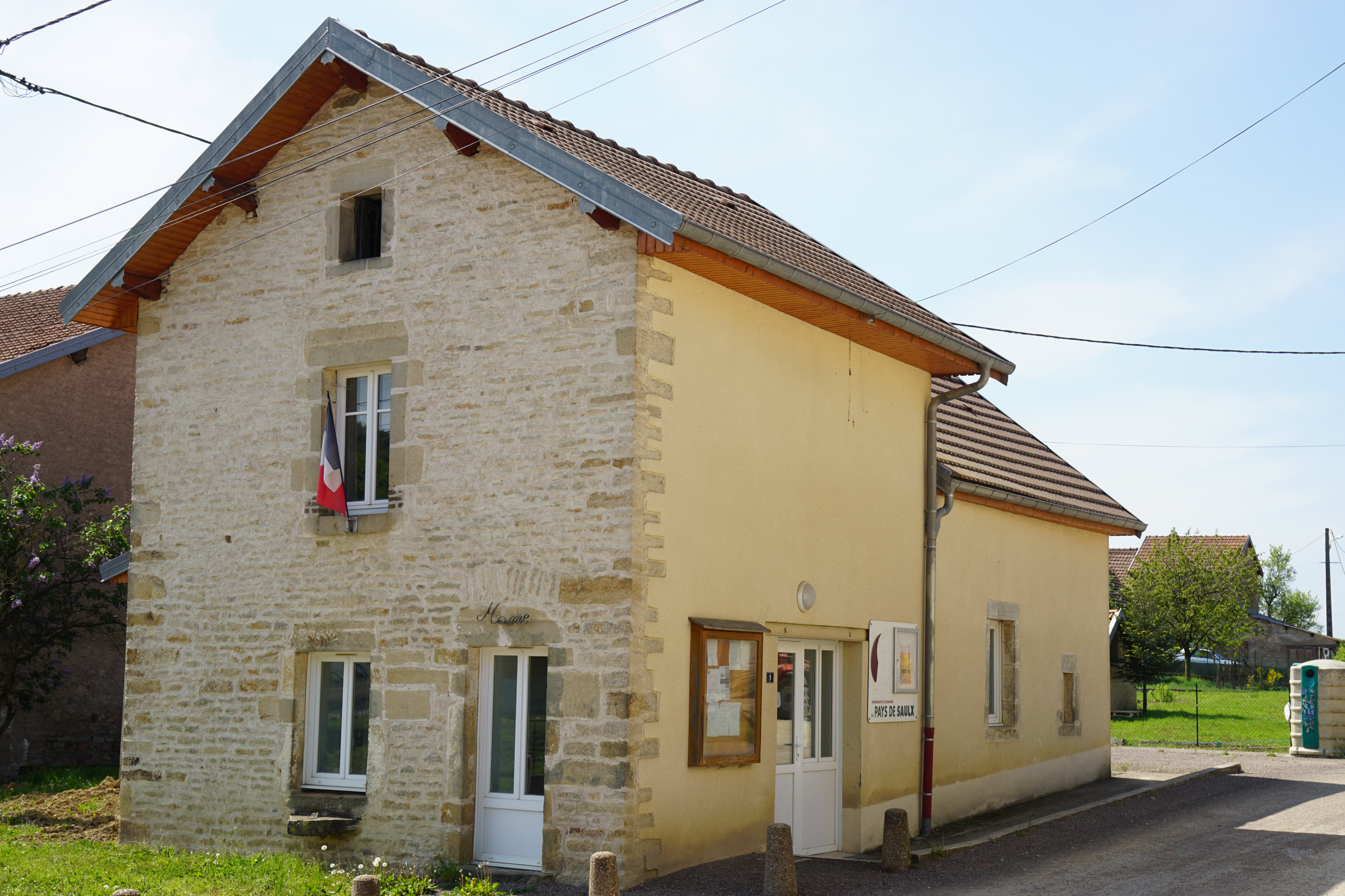 Mairie de Creveney.